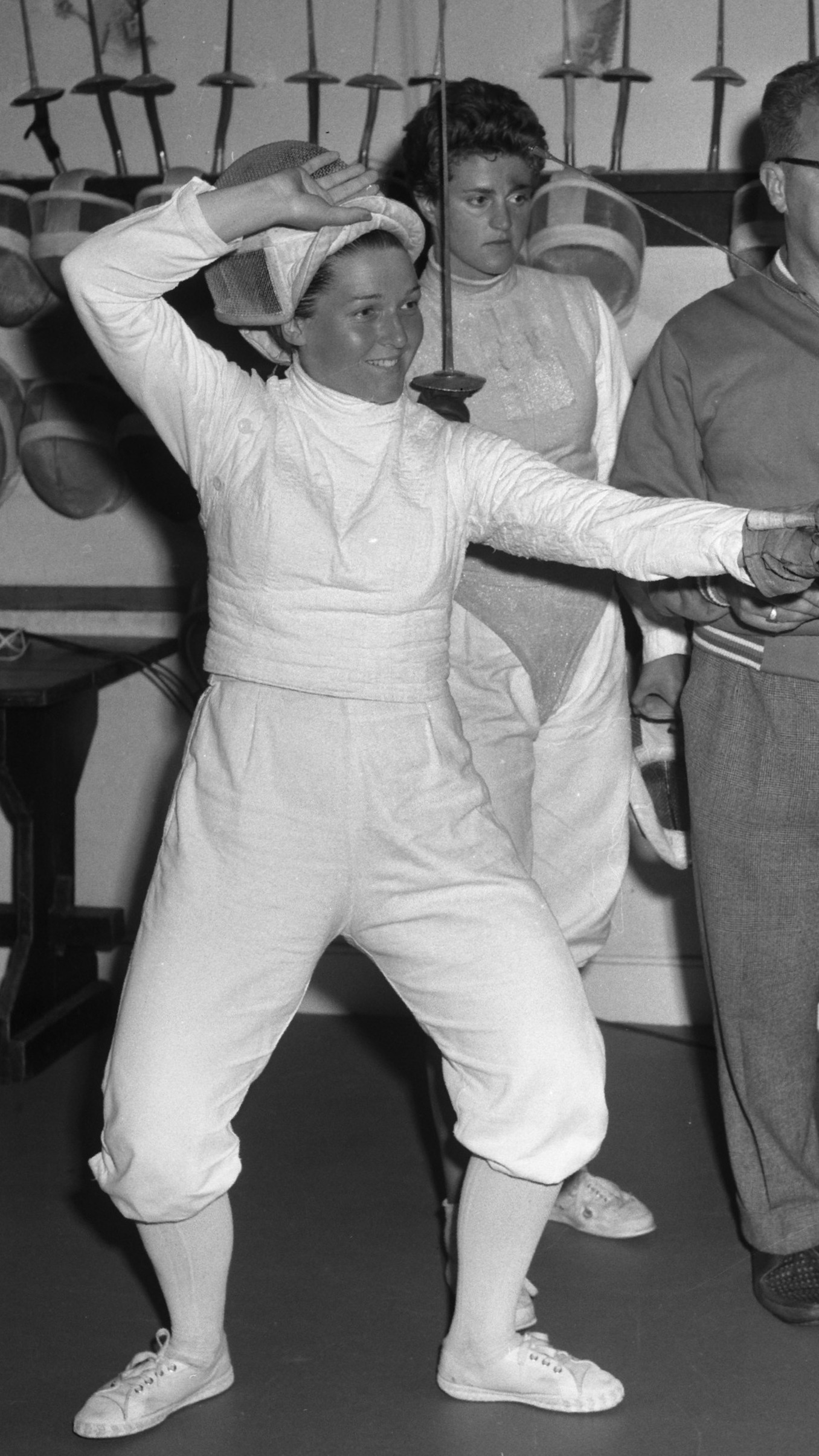 Nederlandse damesschermploeg voor de Olympische Spelen de schermzaal te Rotterdam, Kleyweg, Van Rossem